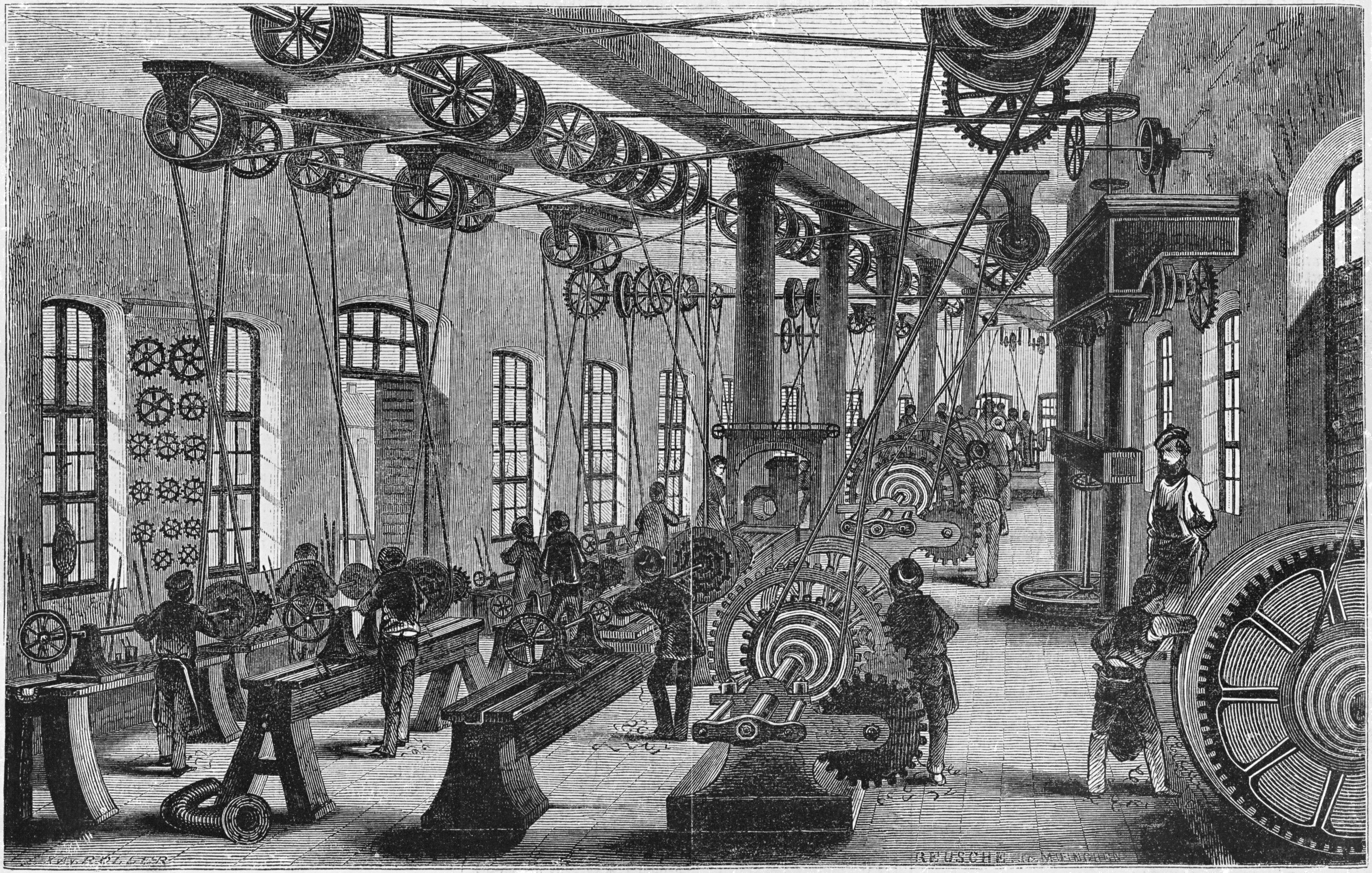 „Die Montirungswerkstatt in der Maschinenbauanstalt von Maffei in Hirschau bei München“ (um 1849). Die Maffeische Maschinenfabrik Hirschau befand sich am Nordrand des Englischen Gartens in München.